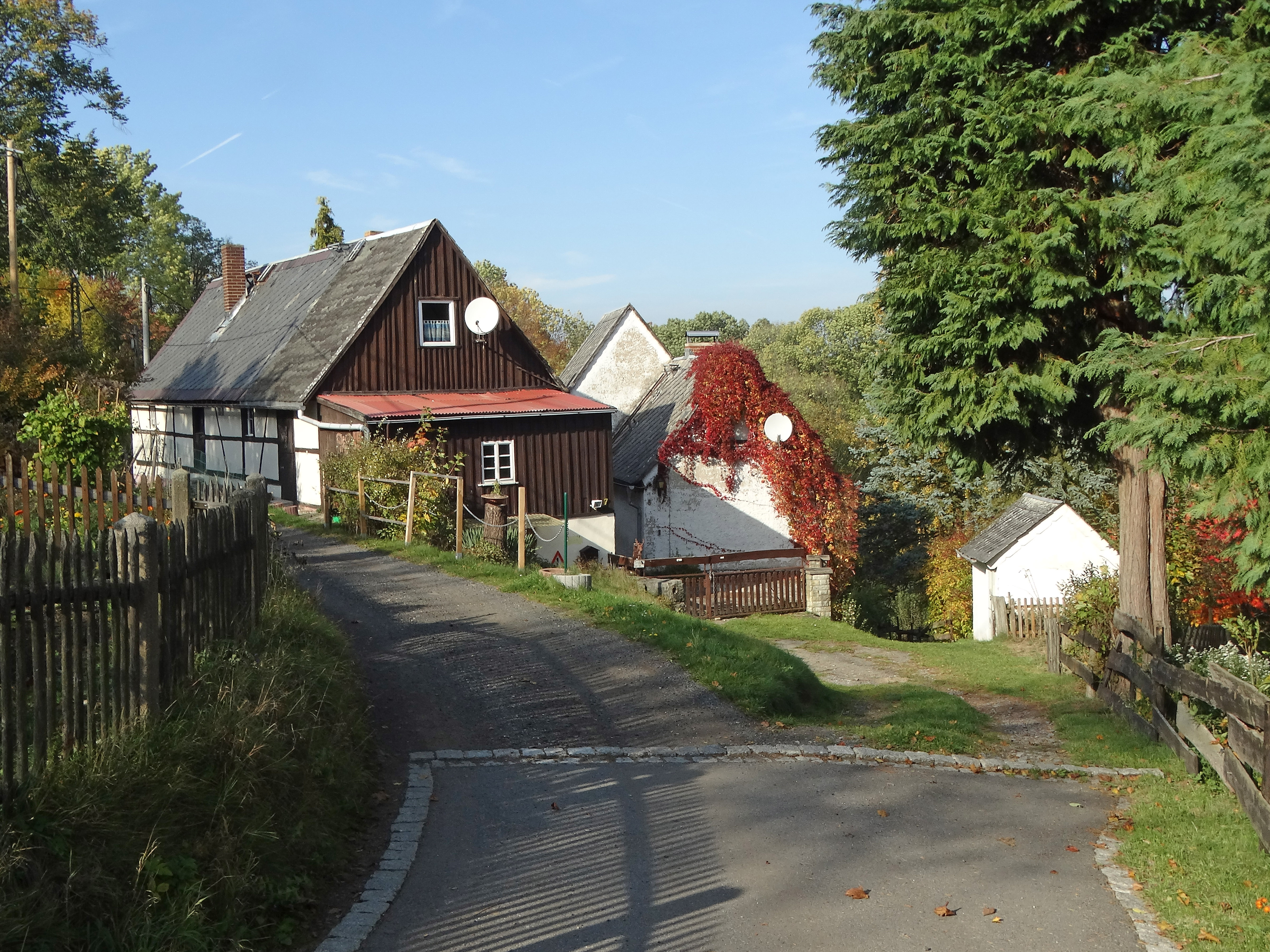 Der Rundling ist die Dorfstraße in Zeschnig, hier verläuft der Fernwanderweg E3